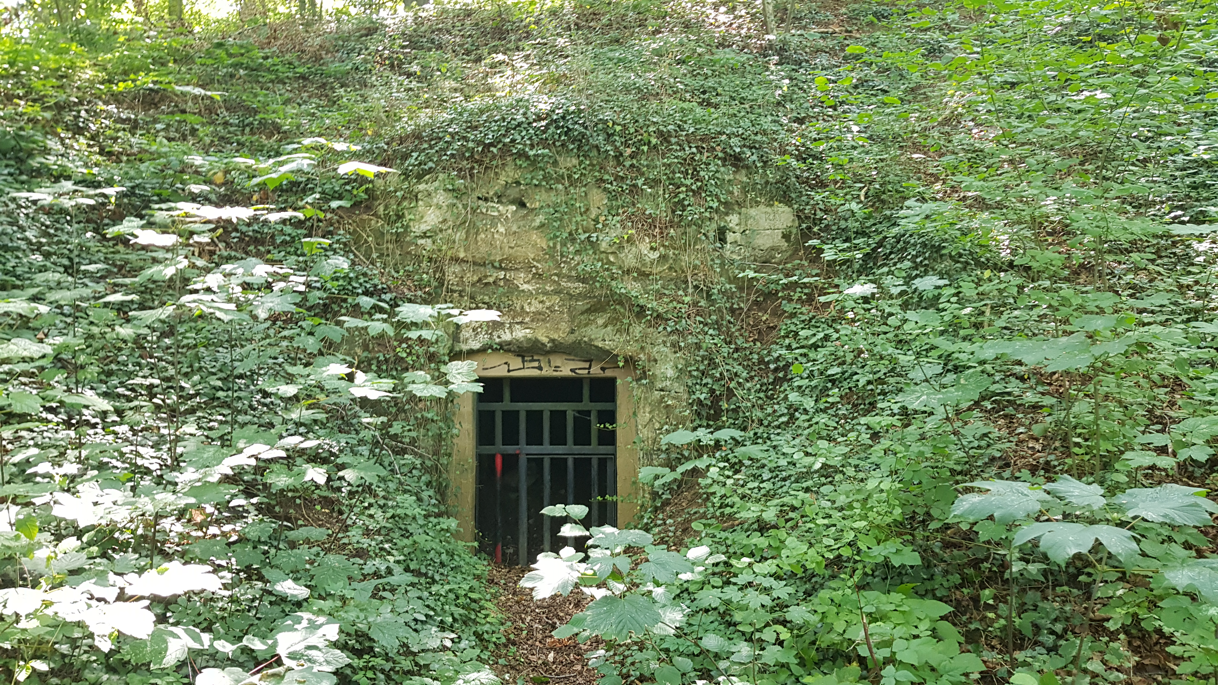 Groeve Pruus Karel II, Valkenburg, Nederland